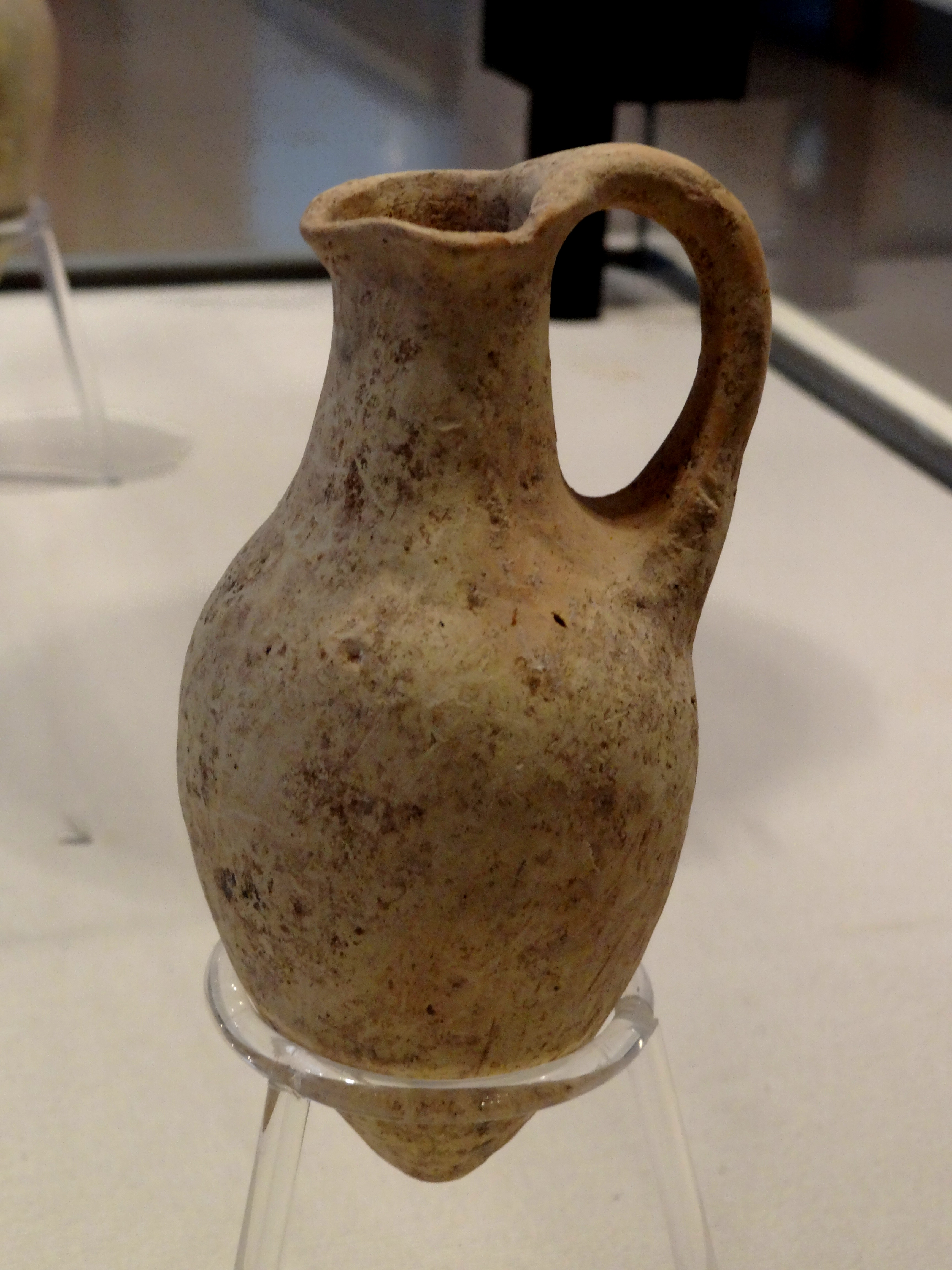 White Shaved ware pottery Late Bronze age 15th-13th centuries BCE from Cyprus. Israeli National Maritime Museum כלים המקורצפים לבן היא משפחה של כלי קרמיקה שמקורה בקפריסין. הכלים נעשו ביד ומאופינים בקרצוף צפוף על פניהם. המשפחה הופיעה בתקופת הברונזה המאוחרת מתוך תערוכה "כלי חרס מקפריסין בעת העתיקה" המוזיאון הימי הלאומי פכית